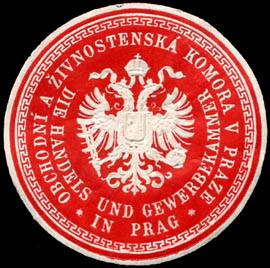 Sealing stamp Title: Die Handels und Gewerbekammer in Prag Description: rot, weiß, geprägt Place: Prag size: 4 cm